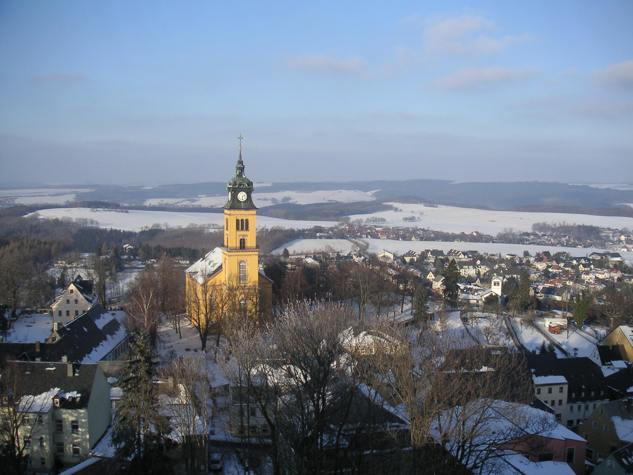 Blick vom Jagdschloß Augustusburg (Sachsen) über den Ort Augustusburg Richtung Stadtkirche St. Petri